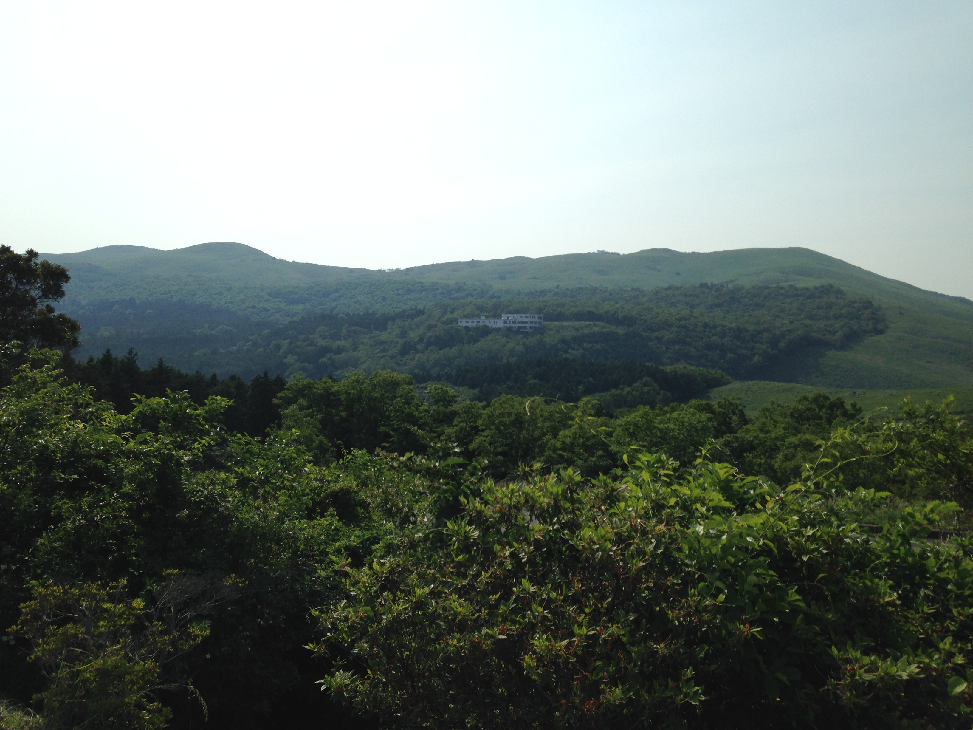 秋吉台カルスト展望台付近より望む龍護峰